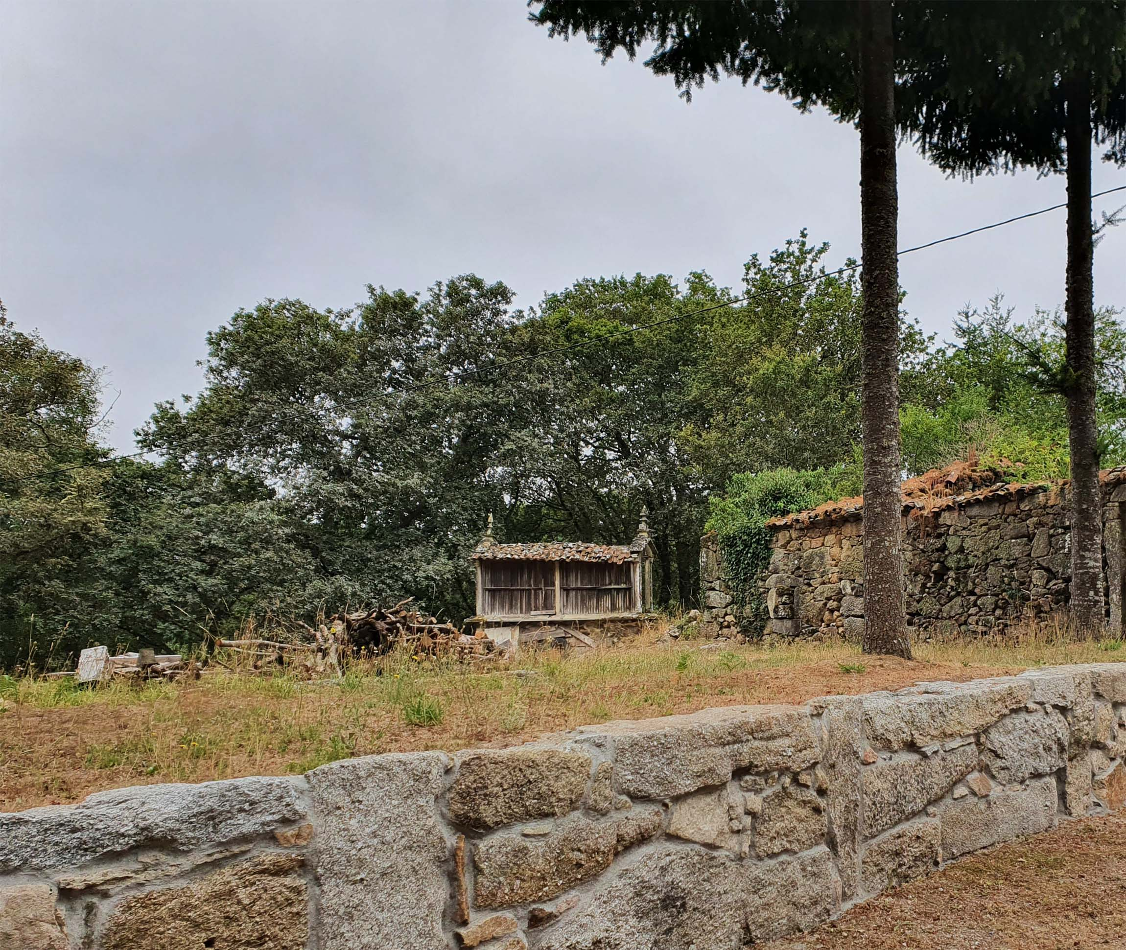 Lugar dos Pedrouzos, na parroquia de San Martiño de Vilapoupre (Antas de Ulla)